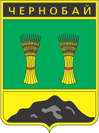 Герб Чорнобая радянського періоду